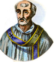 Pope Linus (died 79)